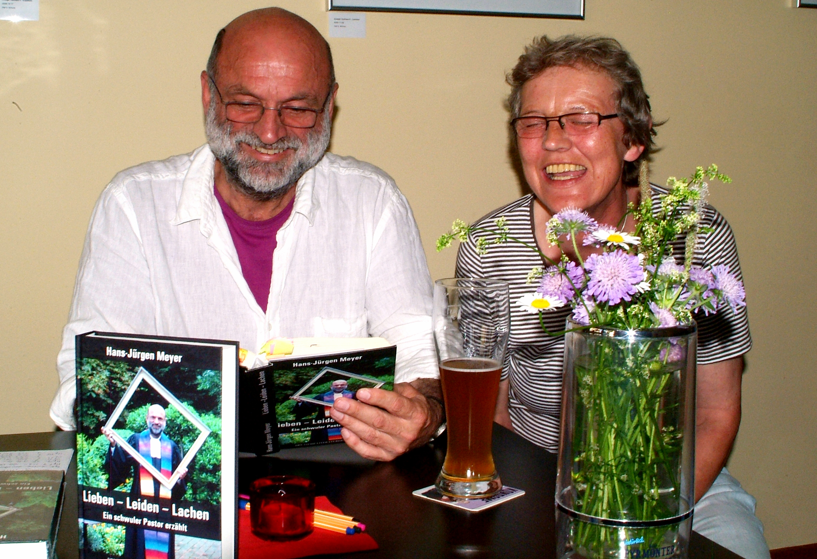 Hans-Jürgen Meyer mit Anne Hagenberg liest im Andersraum aus seinem Buch "Lieben - Leiden -Lachen. Ein schwuler Pfarrer erzählt".